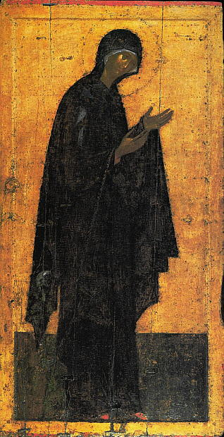 Название: Икона Божией Матери из деисуса, из иконостаса Благовещенского собора Московского Кремля